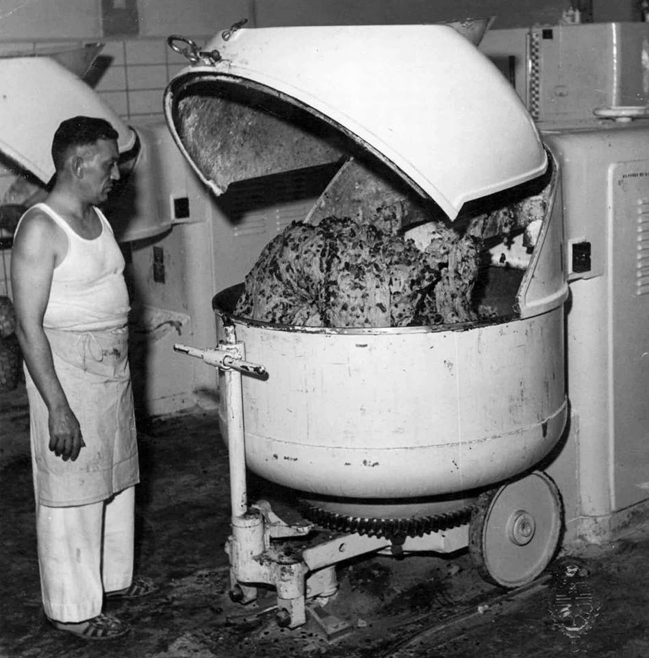 Fábrica Talleres y Panadería "Viuda de Canale e hijos", sobadora de pan dulce, Buenos Aires 1950. Documento fotográfico. Inventario 229043.